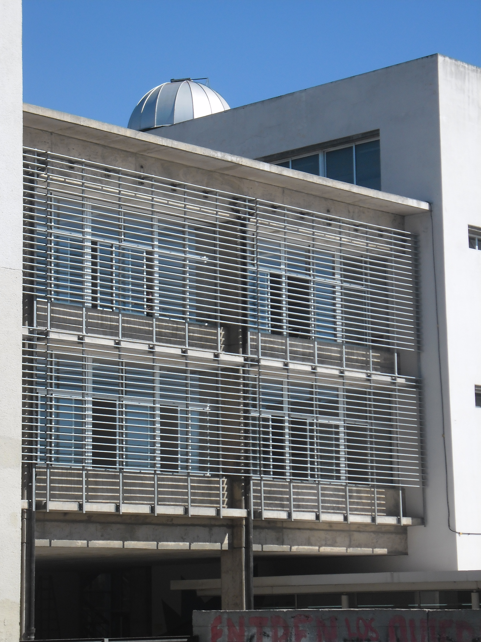 El Observatorio Astronómico perteneciente al Instituto de Profesores Artigas